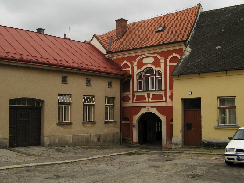 Fara (Počátky), Počátky 2, Počátky.